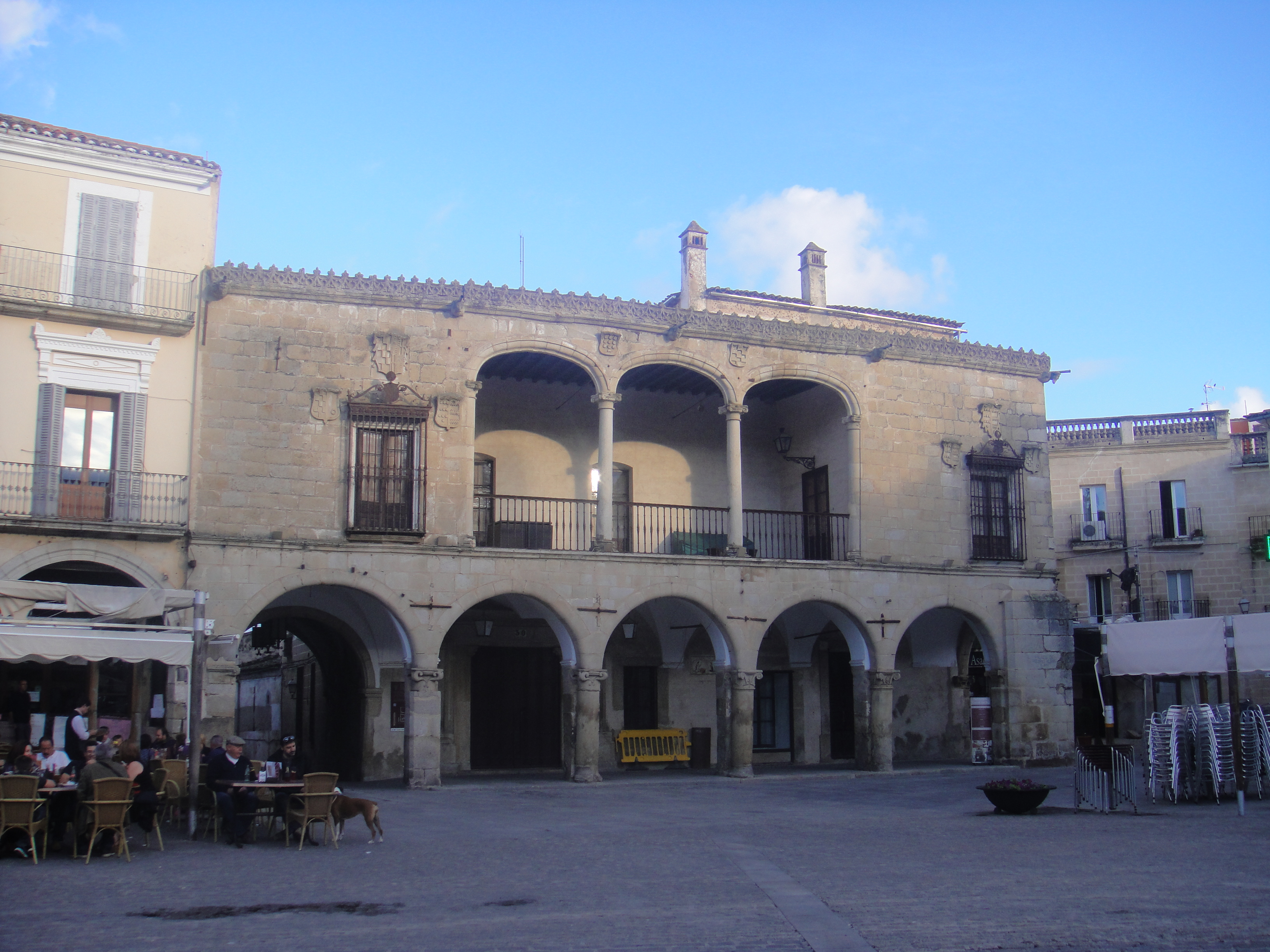 Palacio de los marqueses de Piedras Albas. Plaza mayor de Trujillo. (Cáceres).